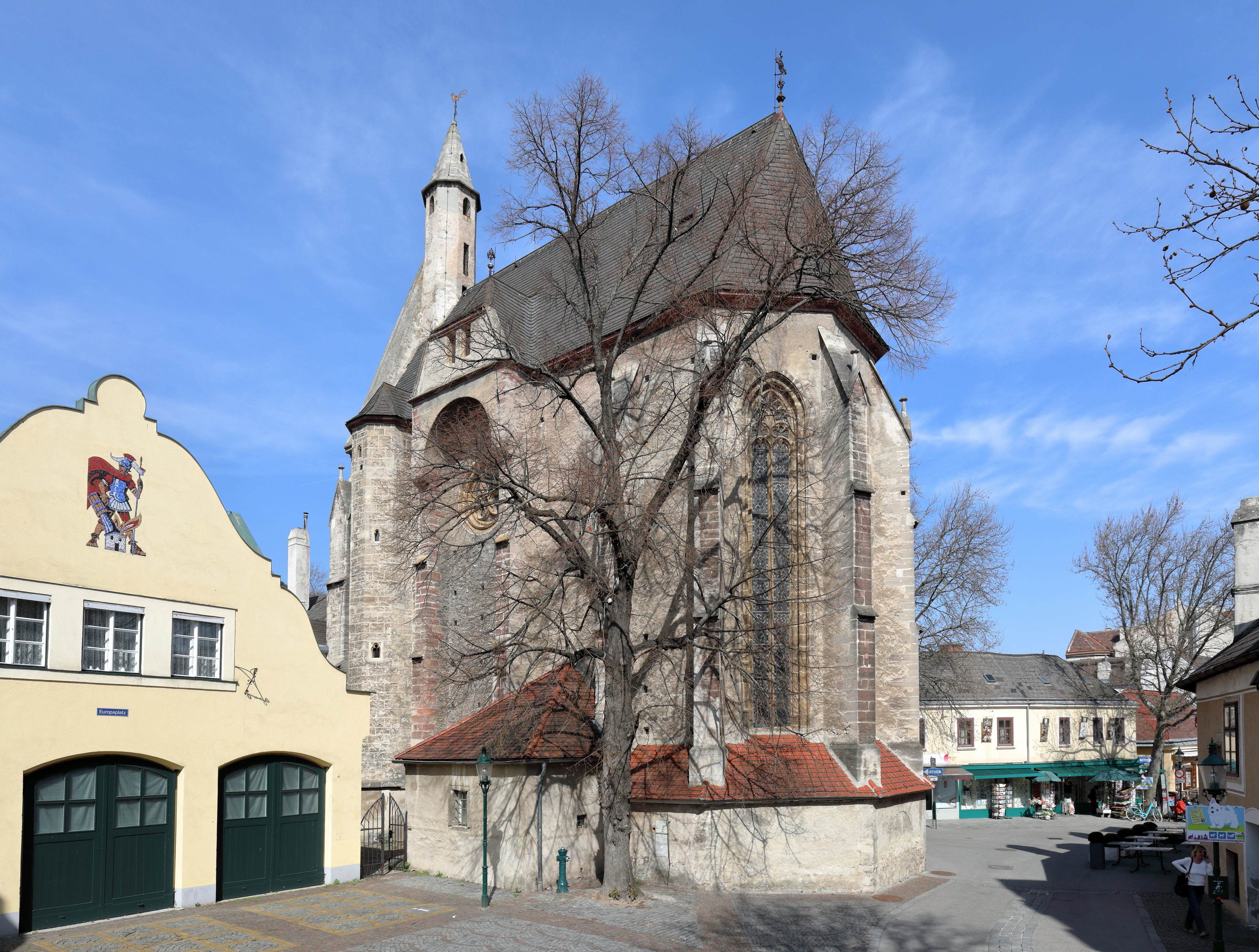 Südostansicht der Spitalskirches in der niederösterreichischen Bezirkshauptstadt Mödling.Die dem hl. Ägydius geweihte spätgotische Saalkirche mit steilem Satteldach und Giebelreiter wurde von 1443 bis 1453 als östlicher Abschluss des ehemaligen Bürgerspitalstaktes errichtet.